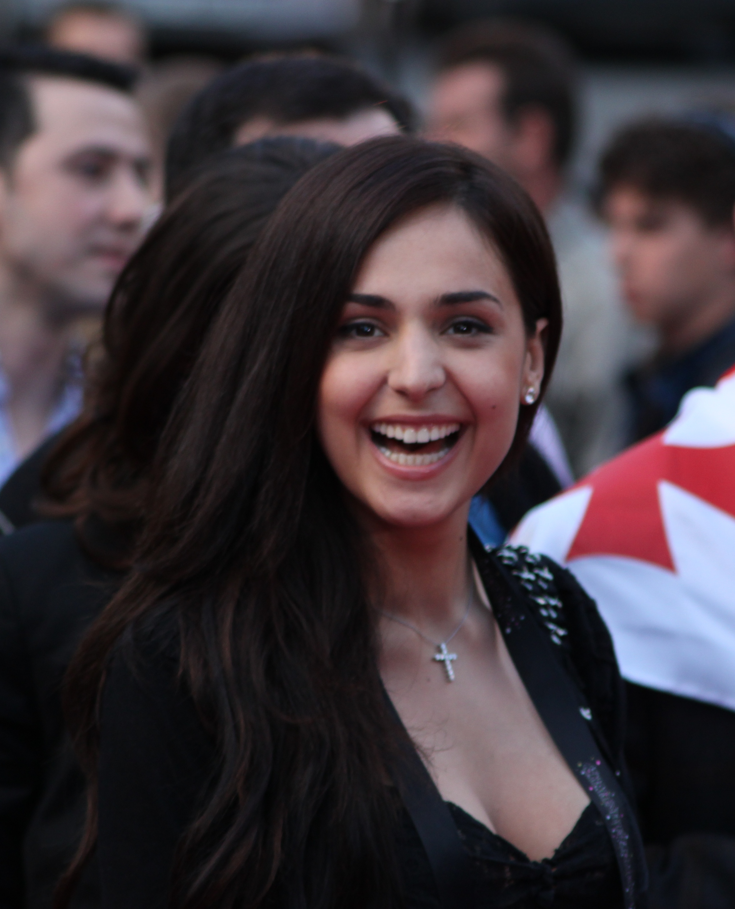 Sopho Nizaradze